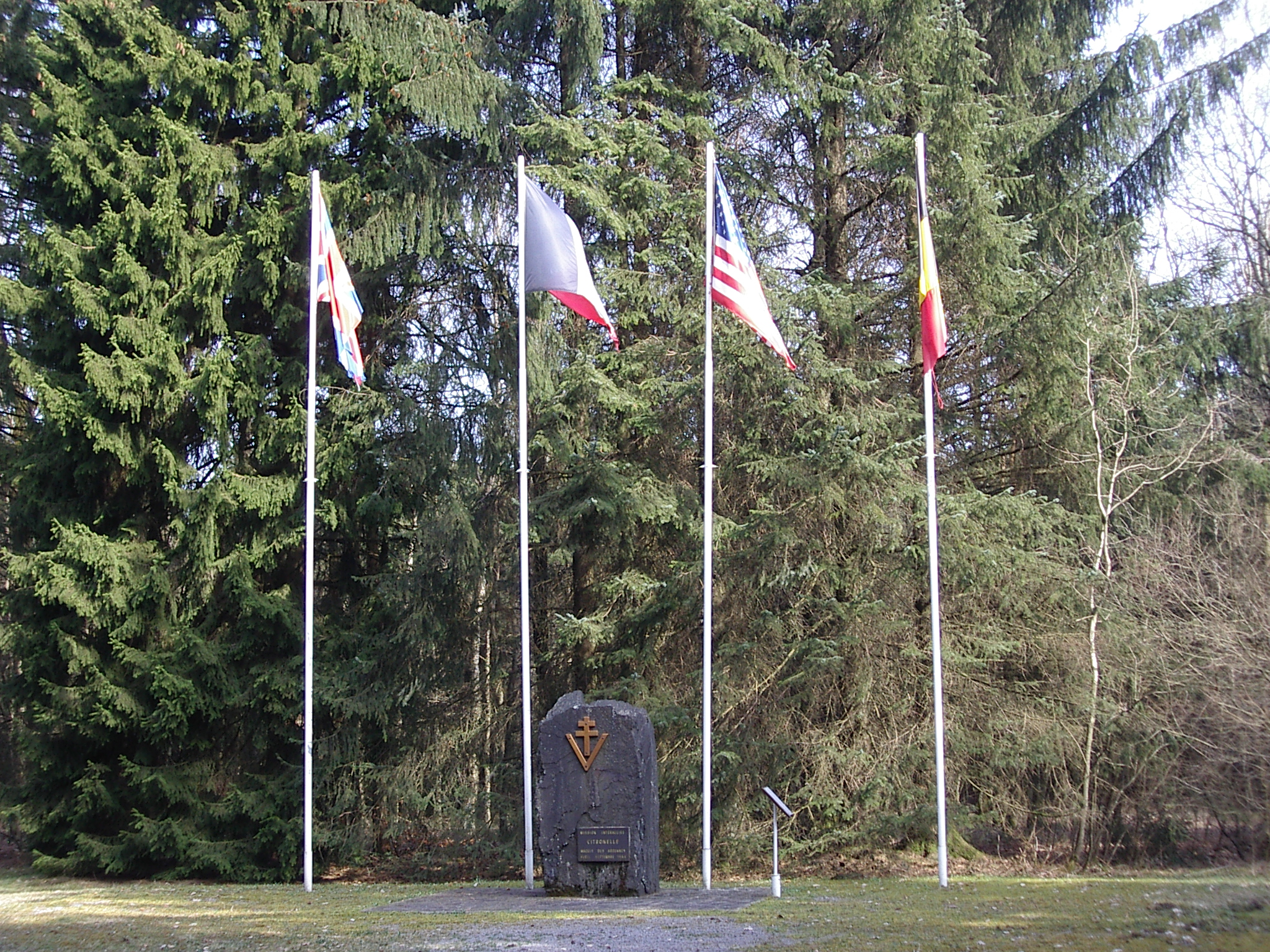 Mémorial Mission Citronelle Localisation - 08800 - Monthermé